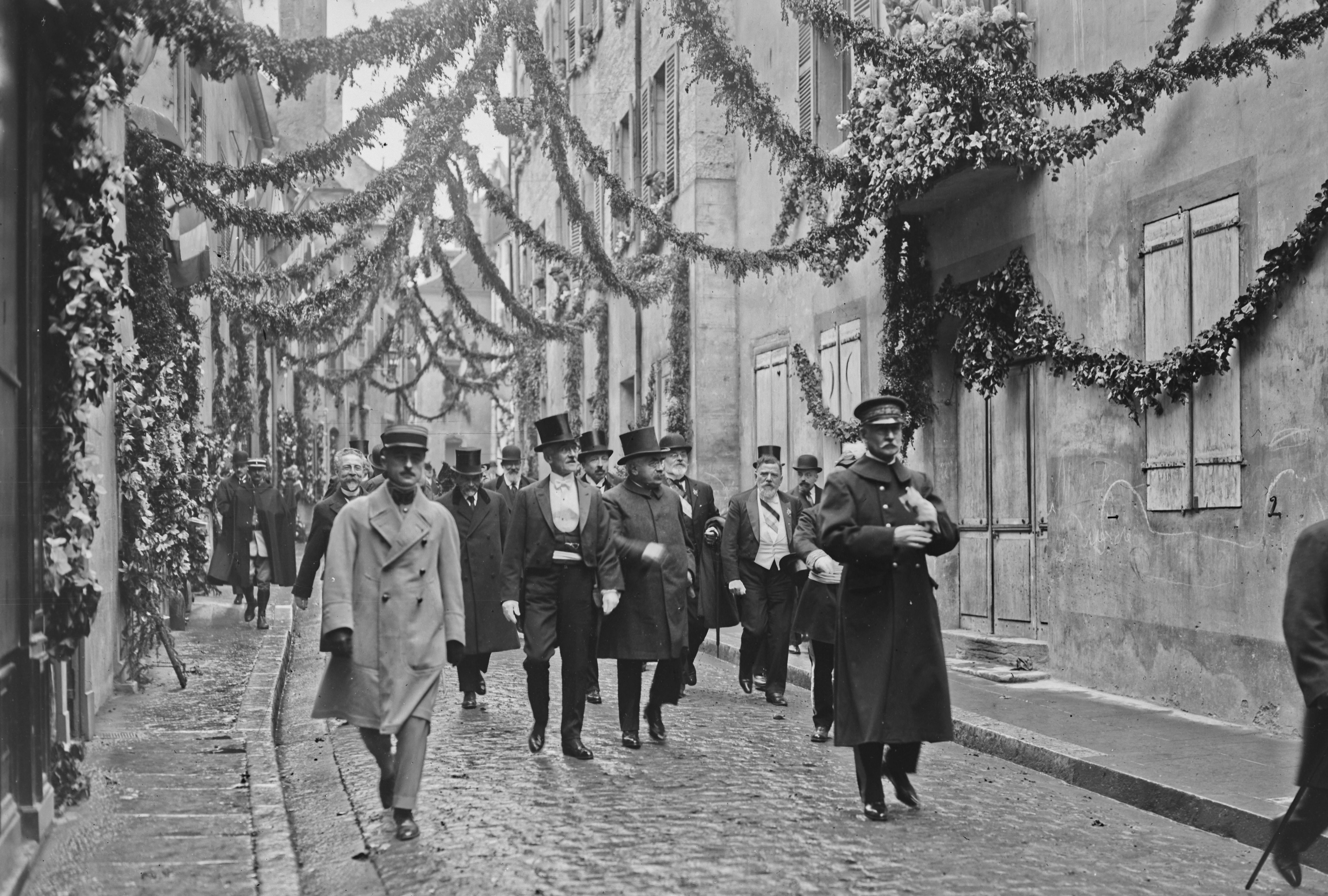 Visite du président Alexandre Millerand à la maison de Pasteur (Dole).